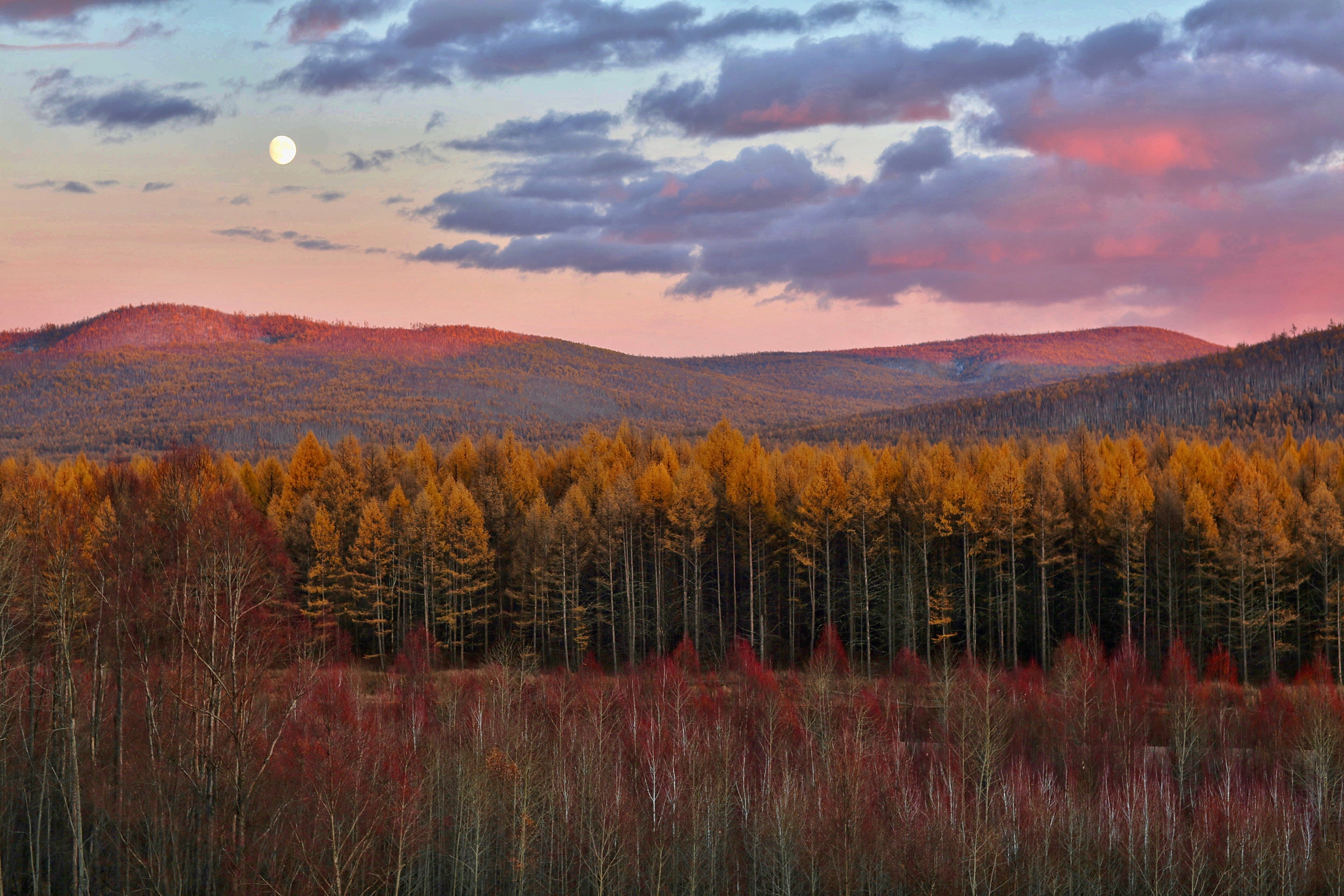 2017年，位于大兴安岭中的根河湿地附近的森林